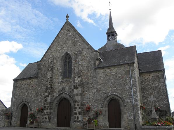 Eglise Notre-Dame de Livré-sur-Changeon (35)